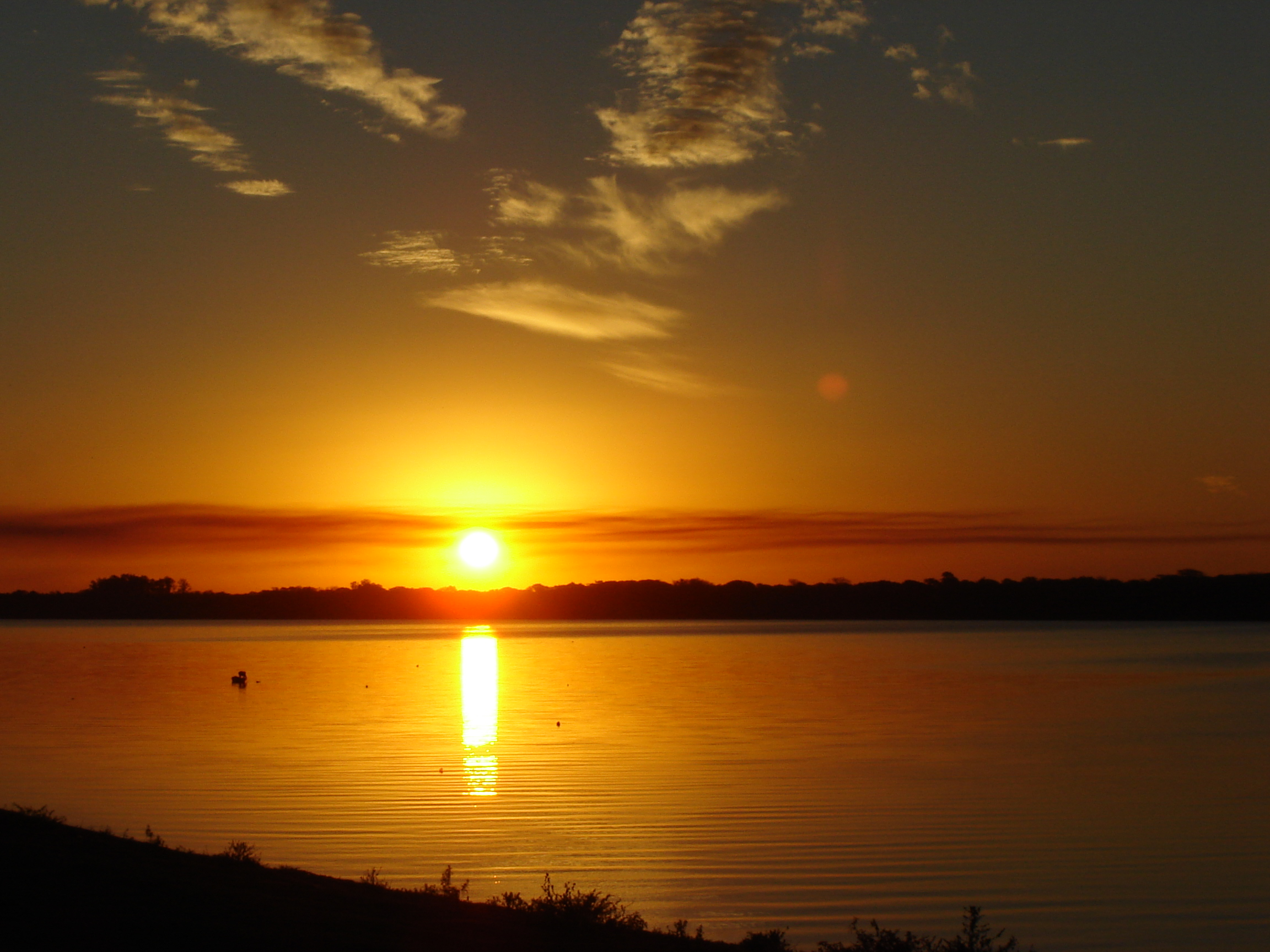 Rio Uruguai ao pôr do sol.